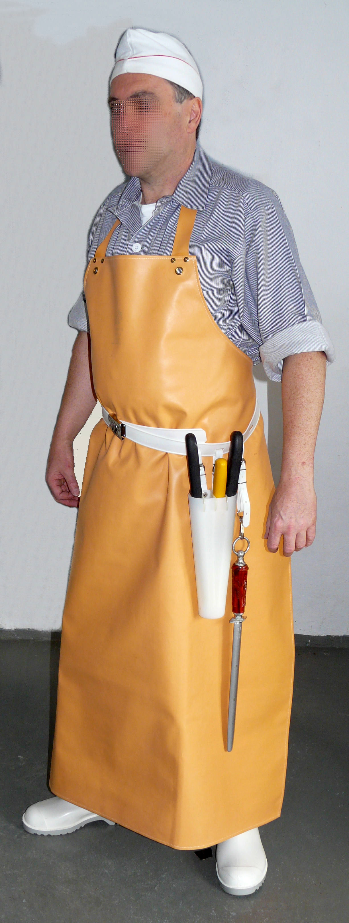 Persönliche Schutzkleidung des Metzgers / Schlachters • Weiße Gummistiefel • Lange Wasserundurchlässige Schürze (Schlachterschürze) • Metzgerkittel (Fleischerjacke) • Weiße Kopfbedeckung, Schiffchen, Mütze in Schlachthöfen auch Schutzhelm Persönliche Ausrüstung beim Schlachten • Messerköcher, Messertasche • Schlachtmesser • Stechmesser • Häutemesser • Wetzstahl Während der Arbeit beim Schlachten trägt der Metzger / Schlachter seine Messer immer griffbereit und sicher untergebracht im Messerköcher (Messertasche) am Gürtel umgeschnallt bei sich. Auch der Wetzstahl am Gürtel eingehängt, ist immer griffbereit.